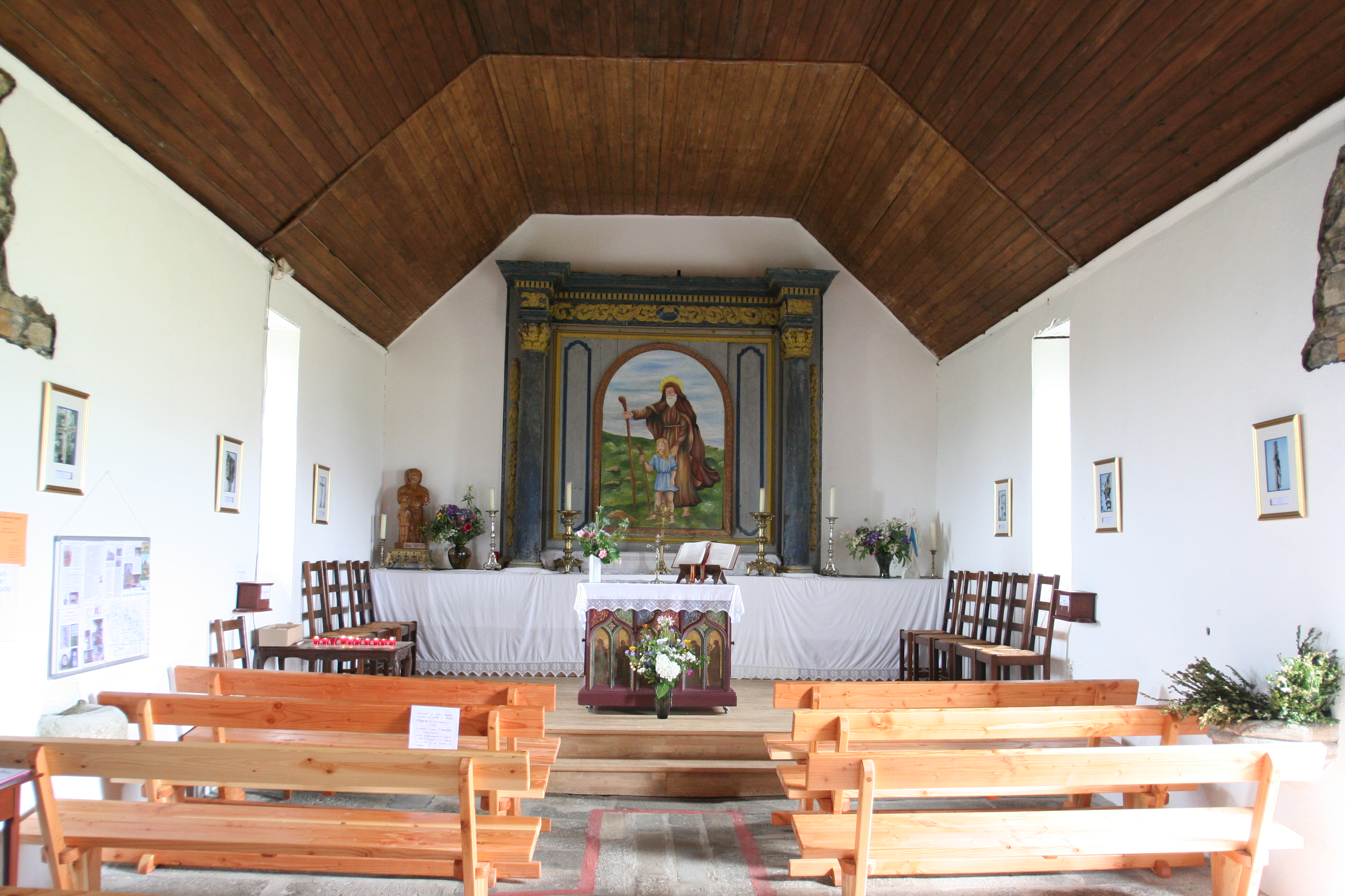 La chapelle Saint-Hervé au sommet du Menez Bré à Pédernec.